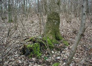 Stævnet træ ved Malling Template:Coppiced tree near Malling, Jutland